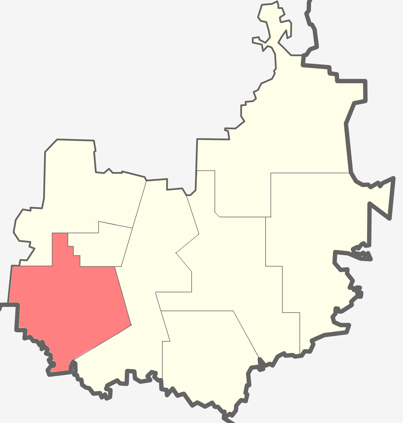 Борское сельское поселение на карте Бокситогорского района Ленинградской области.